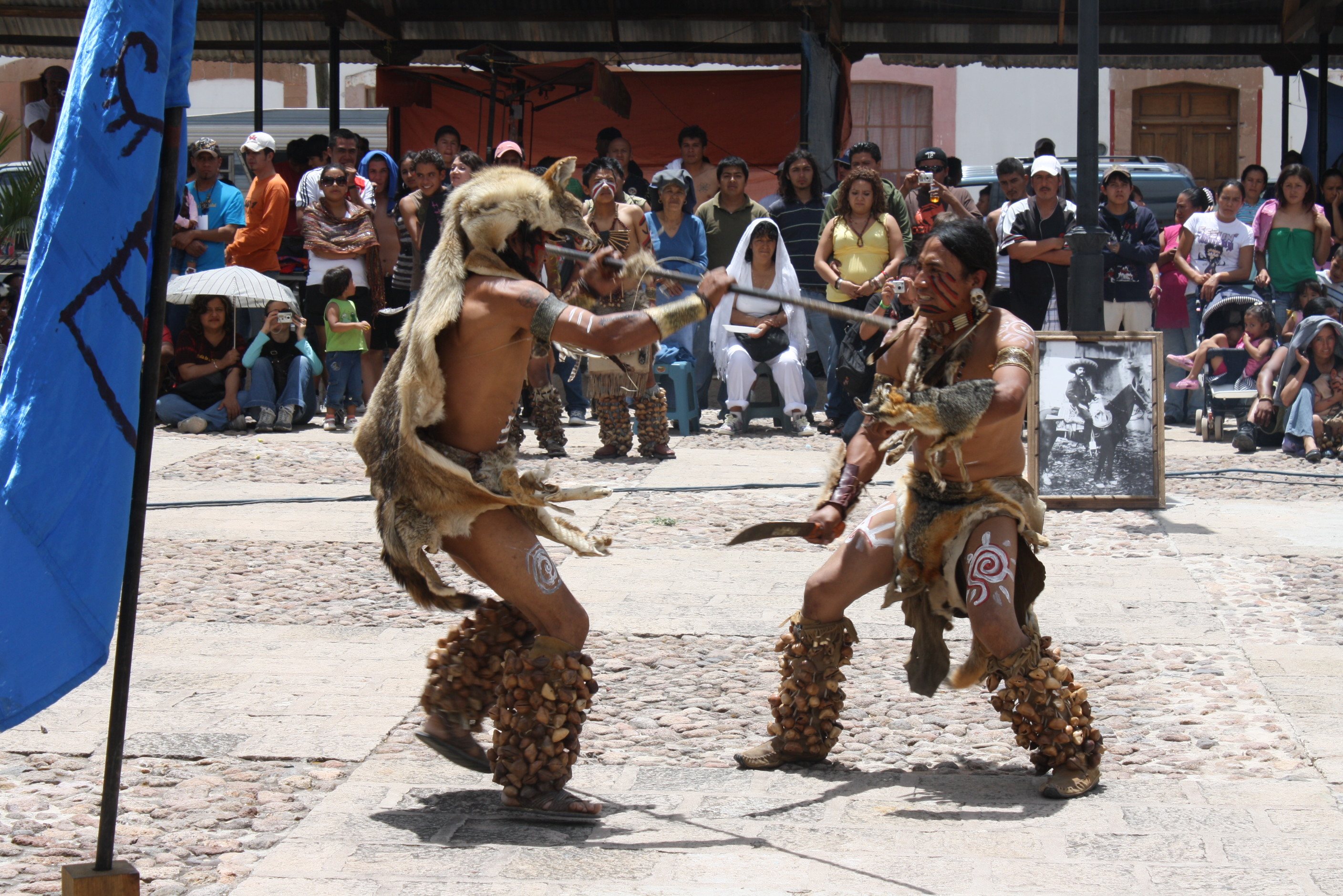 W:Chichimeca Jonaz Indians perform ritual dance at Mineral de Pozos, W:Guanajuato, Mexico